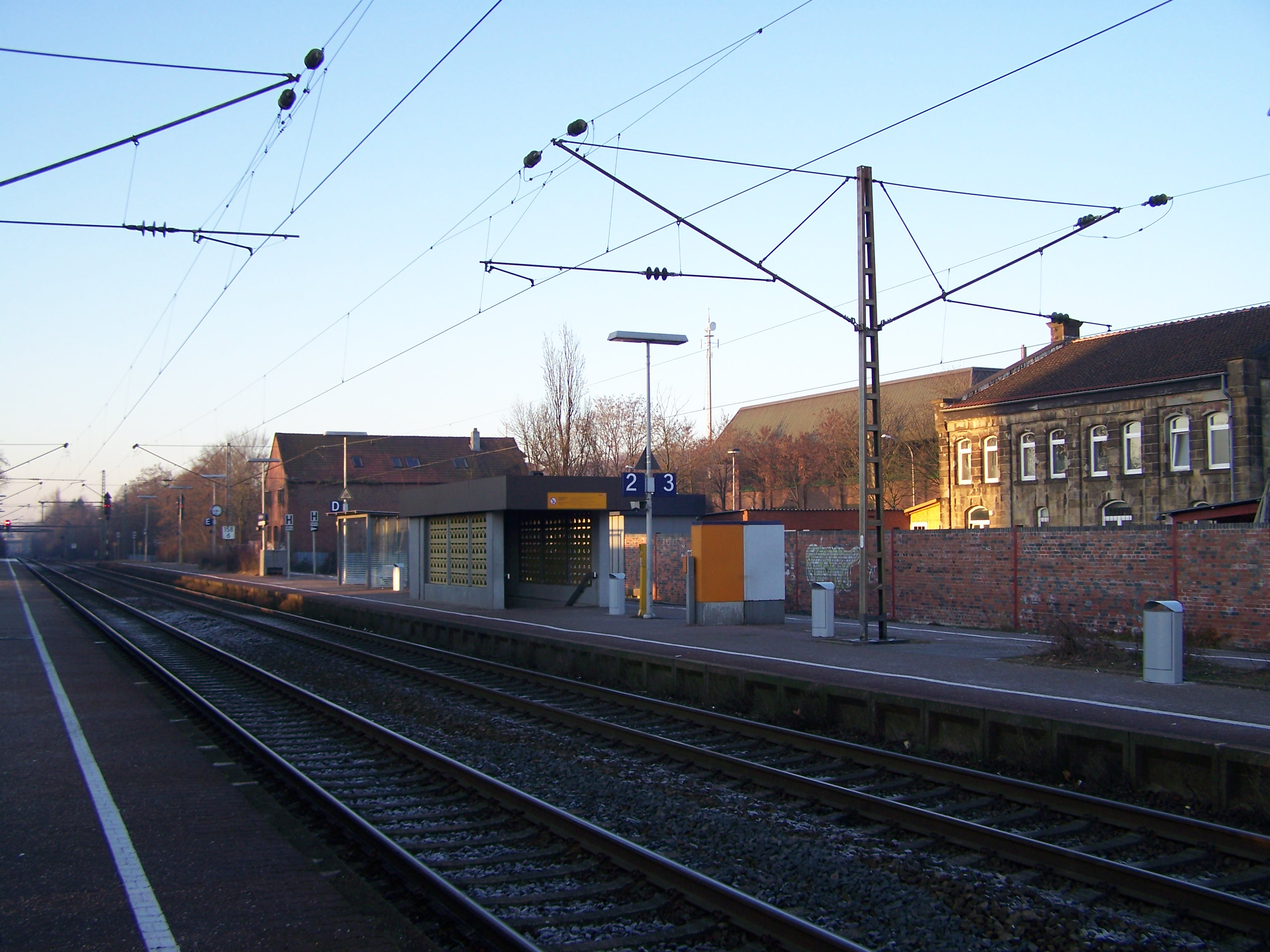 Ehemaliger Bahnhof in Ibbenbüren, Nordrhein-Westfalen, Deutschland. Rechts Sandsteingebäude ist die alte Kaue der Kohlenwäsche, heute eine Moschee.